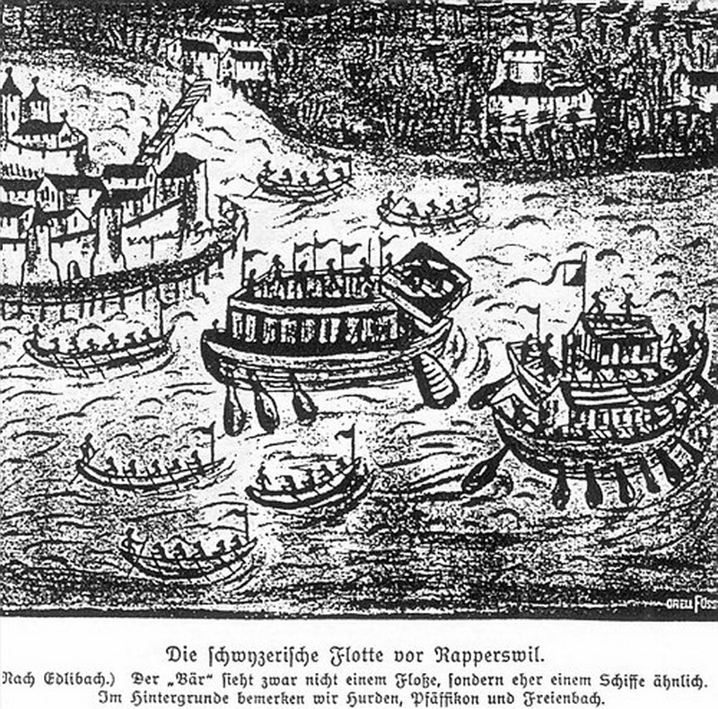 Belagerung von Rapperswil (SG) durch die Innerschweizer während des Alten Zürichkriegs.Beschreibung: Die Schwyzerische Flotte vor Rapperswil (Nach Edlibach)Der «Bär» [gemeint ist das Kampffloss gleichen Namens] sieht zwar nicht einem Flosse, sondern eher einem Schiffe ähnlich. Im Hintergrund Hurden, Pfäffikon und Freienbach. Dargestellt ist die Schwyzer 'Seeflotte' während des Alten Zürichkriegs, darunter das Kampffloss «Bär» im Bereich des Endingerhorns, geografisch betrachtet eigentlich in der Kempratnerbucht auf dem Zürichsee. Die Stadtansicht ist falsch wiedergegeben, deutlich zu erkennen ist hingegen auf dem Lindenhof (Schlosshügel) die Stadtpfarrkirche, sowie im Hintergrund die Holzbrücke respektive links davon der Obersee.